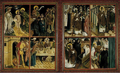 Retable de Billerbeck fermé